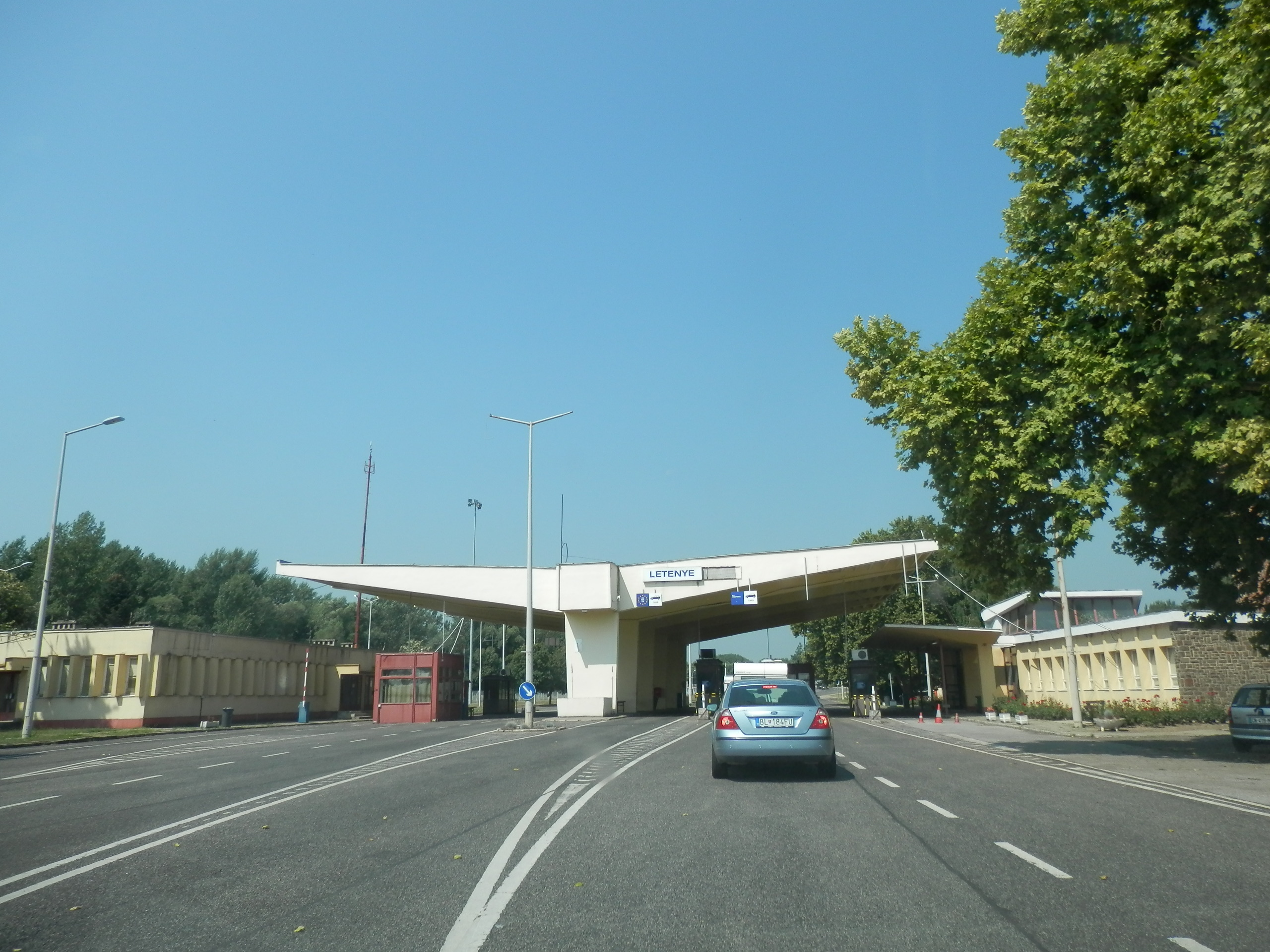 Obec Letenye Maďarsko pred hraničným priechodom Goričan do Chorvátska.. Leto 2013.